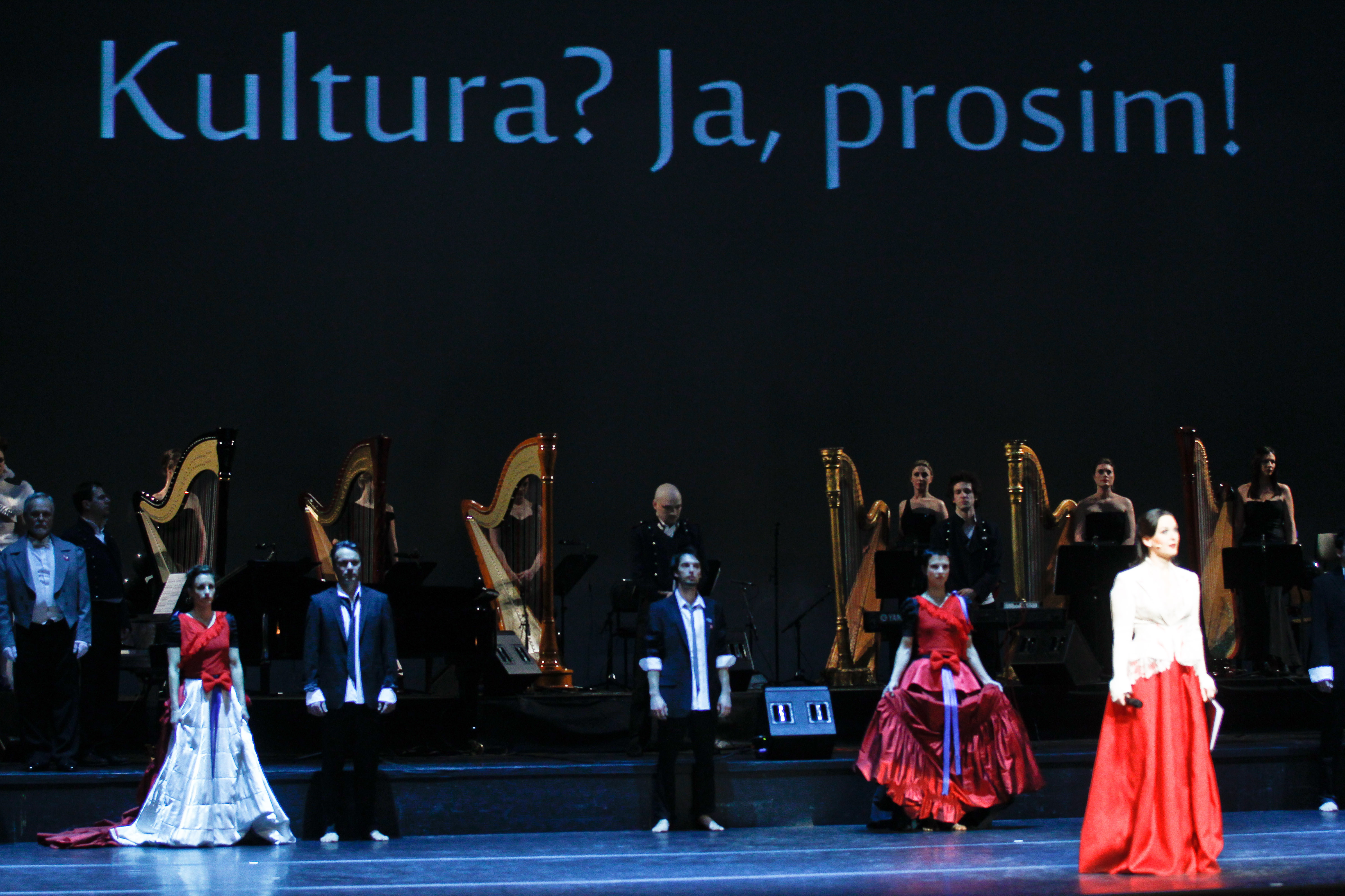 Državna proslava ob Prešernovem dnevu